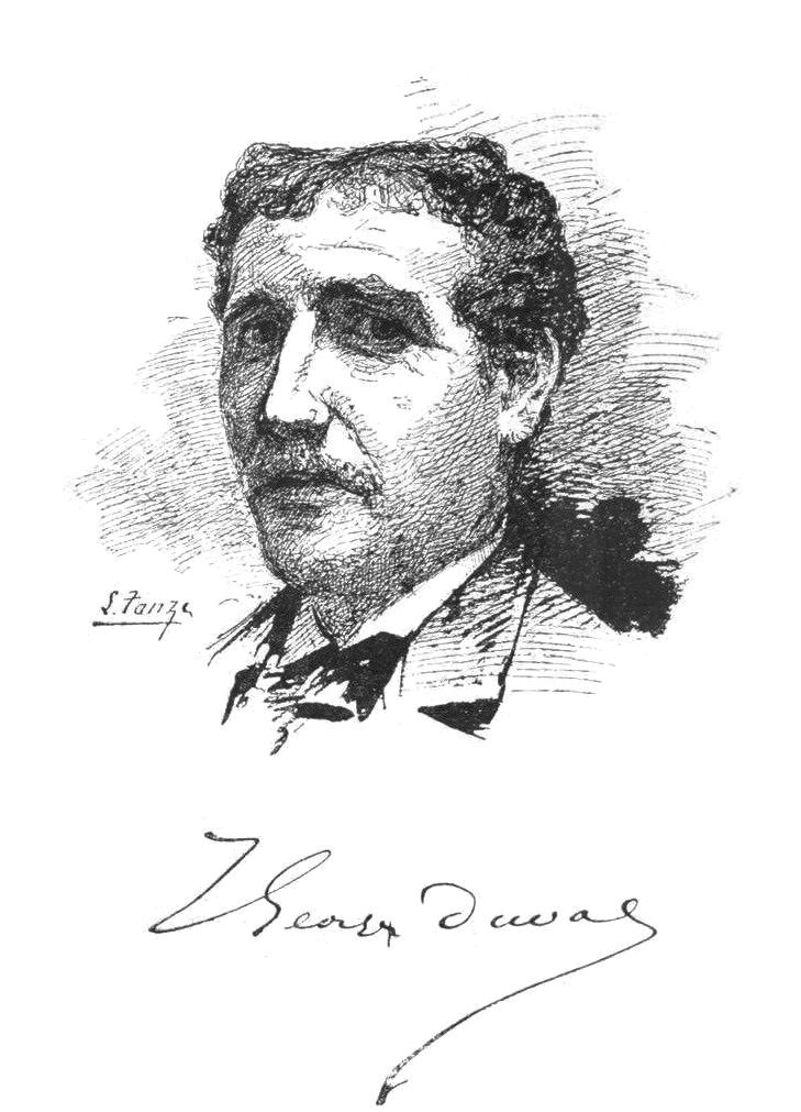 Georges Duval.